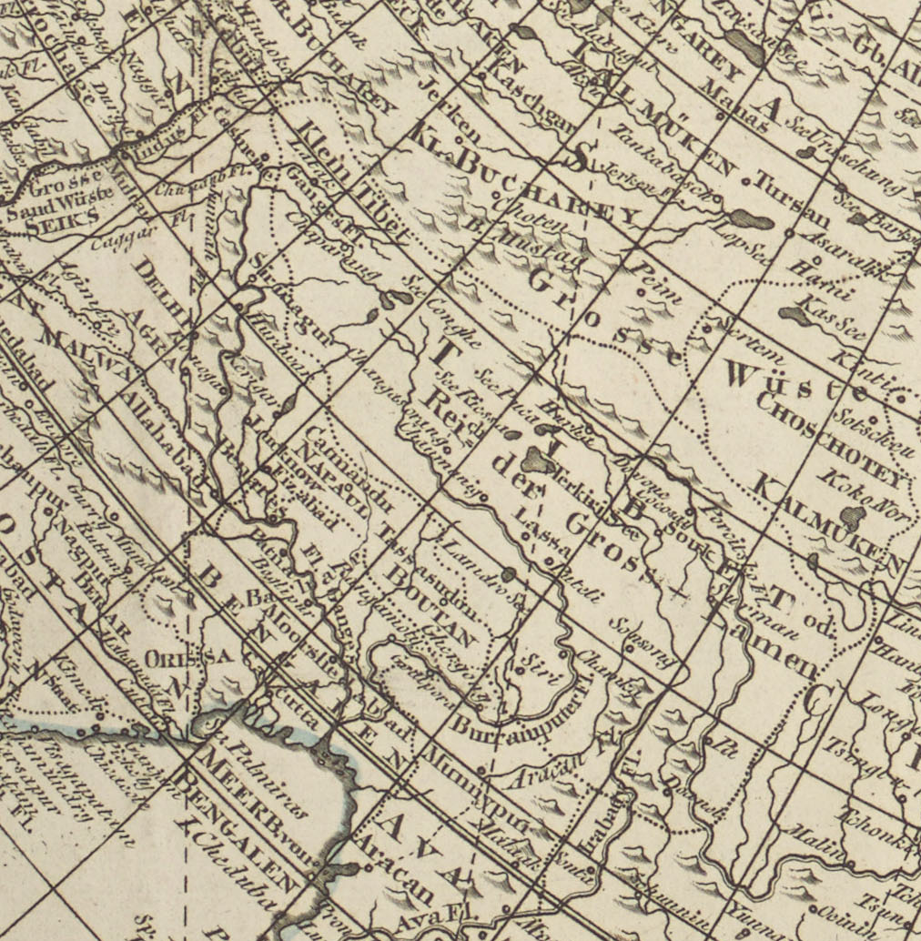 1 Kt. : Grenzen kolor. (Diam. 58 cm) ; Koordinaten E 179°01'00"-W 179°01'00"/N 85°00'00"-S 0°00'00" ; Vermutlich aus: Allgemeiner Grosser Atlass / Herausgegeben von F. A. Schraembl ; 3. - Maßstab in graph. Form (geographische Meilen). - Maßstab unterhalb des Kt.-Feldes. - Nullmeridian: Wien. - Kt. in Kreisform. - Relief: Einzelberge